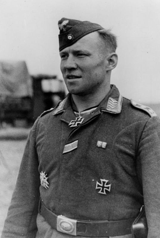 Ritterkreuzträger Oberwachtmeister Nelke. 20.8.40 Fr. OKW PK Presse-Hoffmann